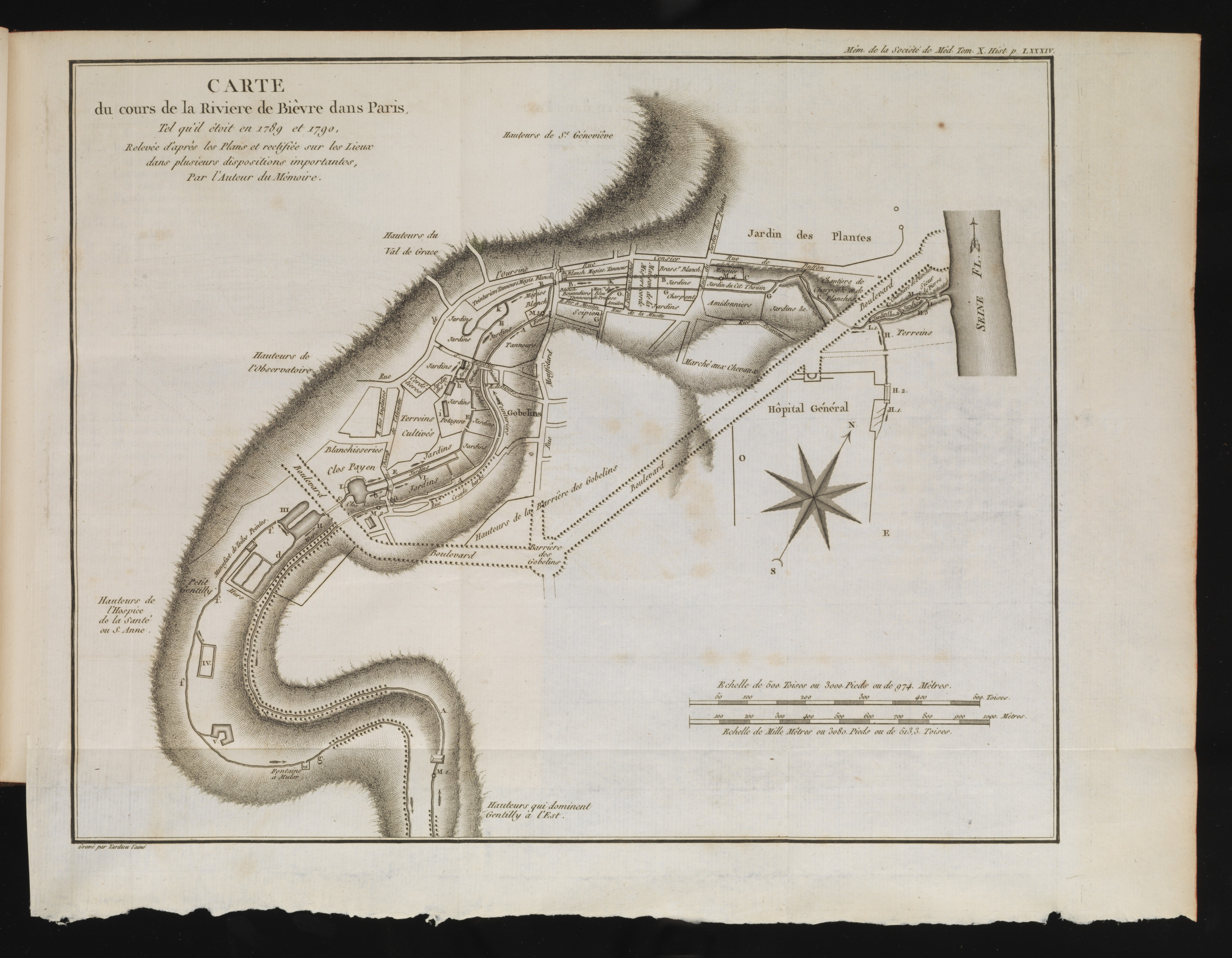 Histoire de la Société royale de médecine année 1776-1789 Carte du cours de la Riviere de Bievre dans Paris. Rare Books Keywords: Map; Maps